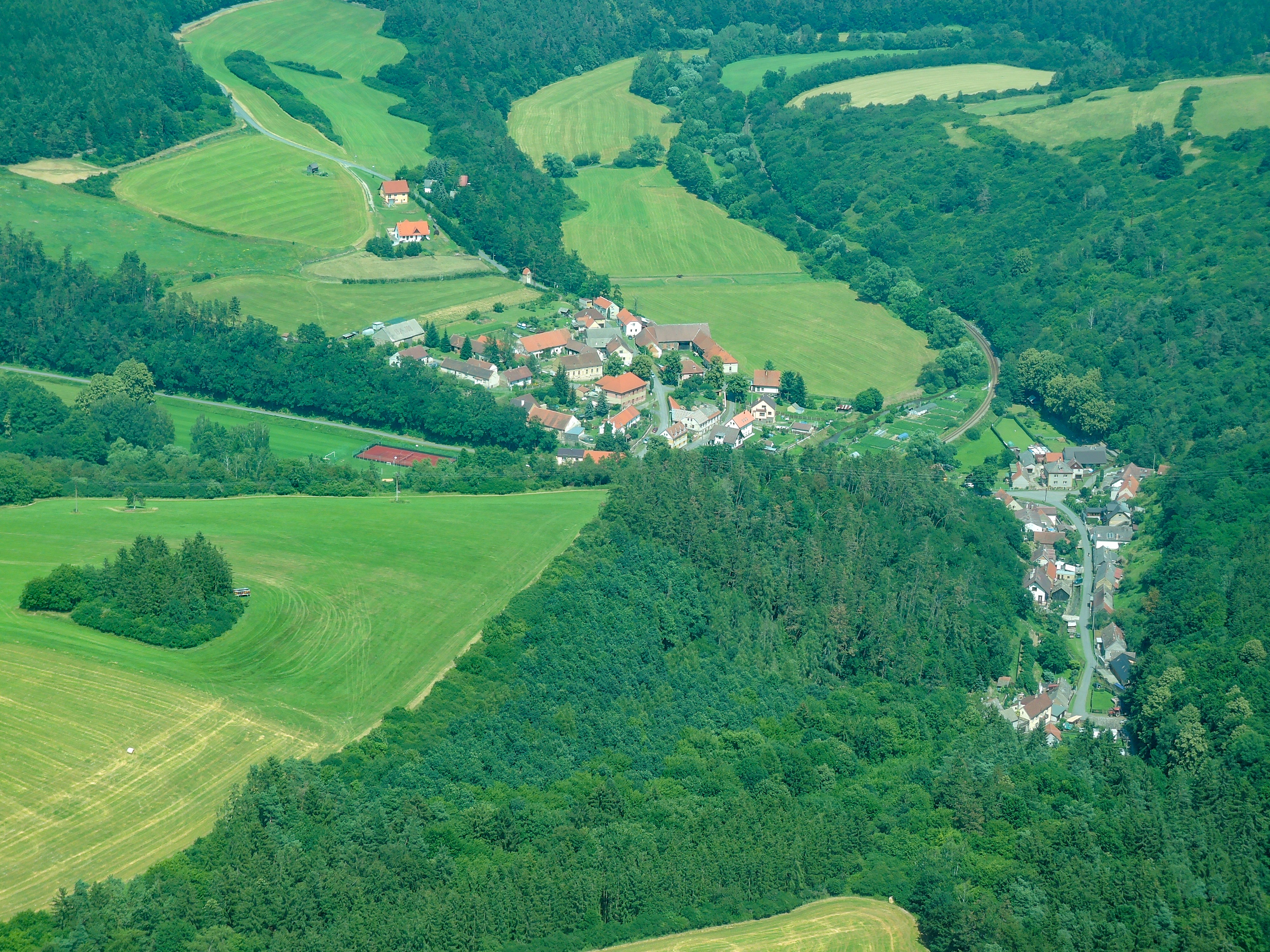 Pustověty (okr. Rakovník), pohled z letadla